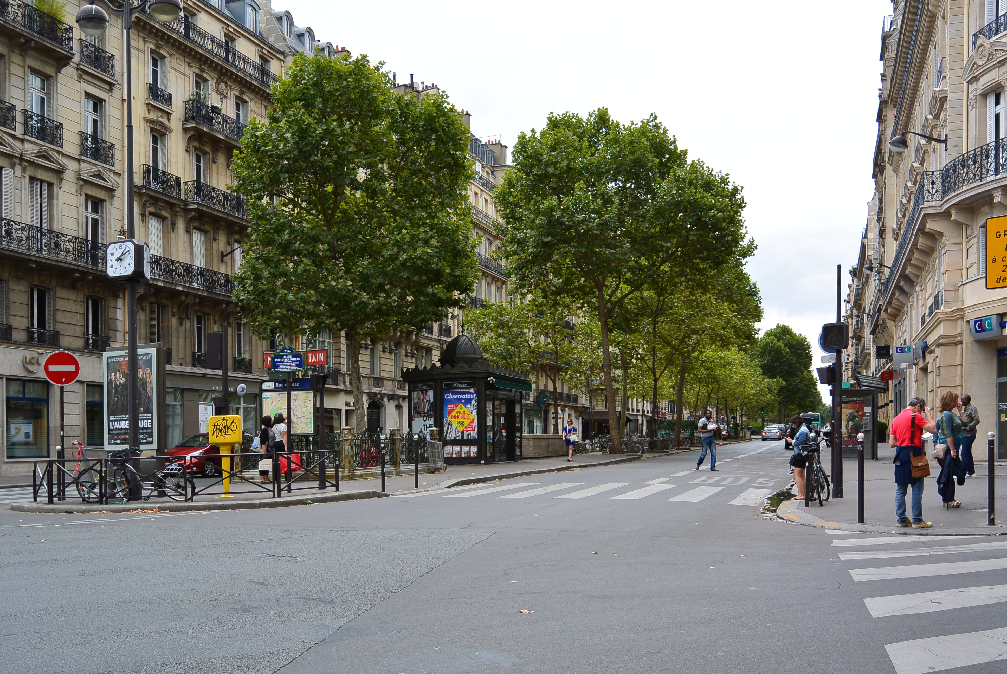 Boulevard Raspail, Paris.